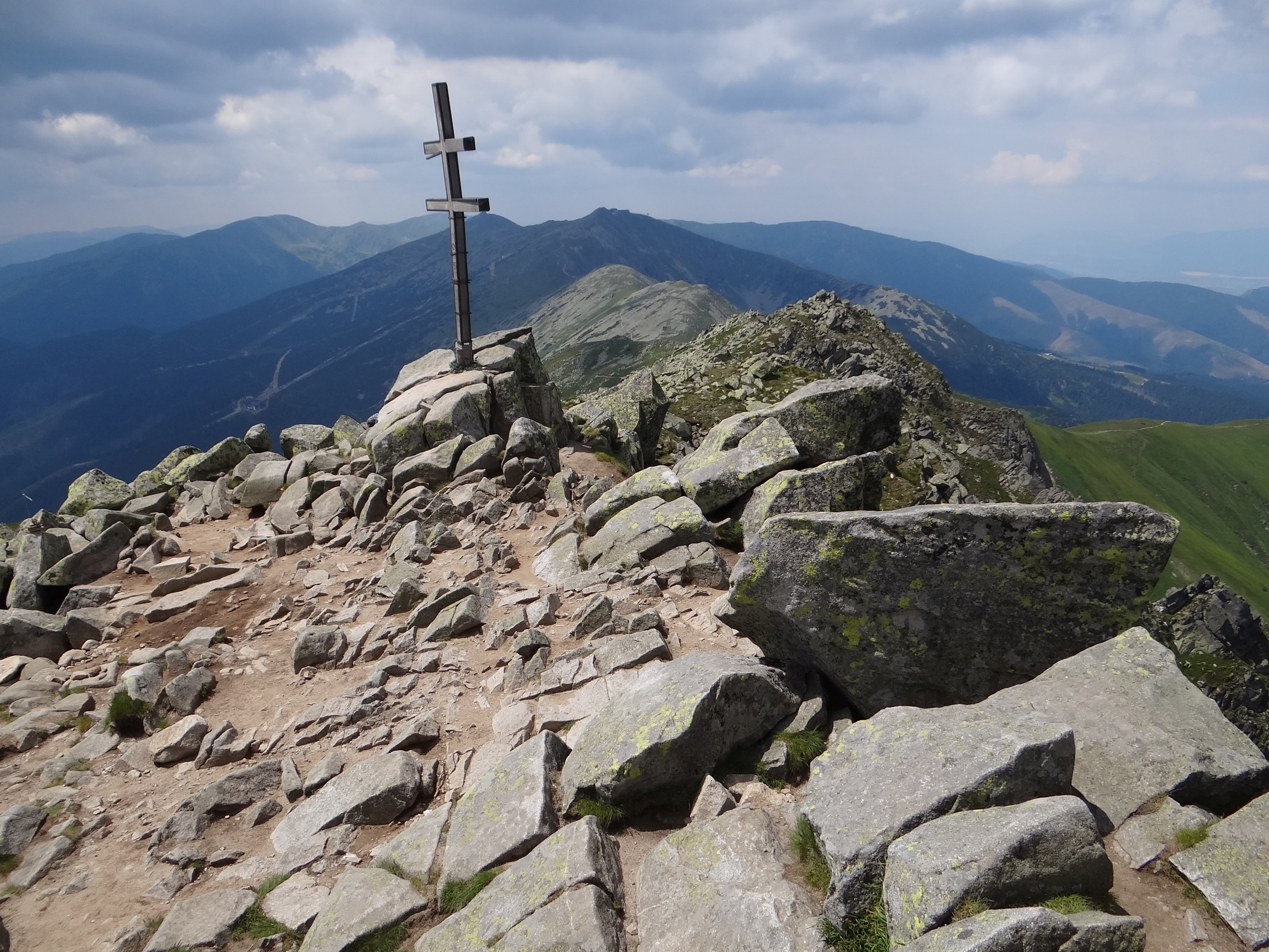 Ďumbier